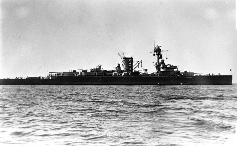 Panzerschiff "Deutschland" Panzerschiff "Deutschland", später schwerer Kreuzer "Lützow" auf See. Ansicht der Steuerbordseite